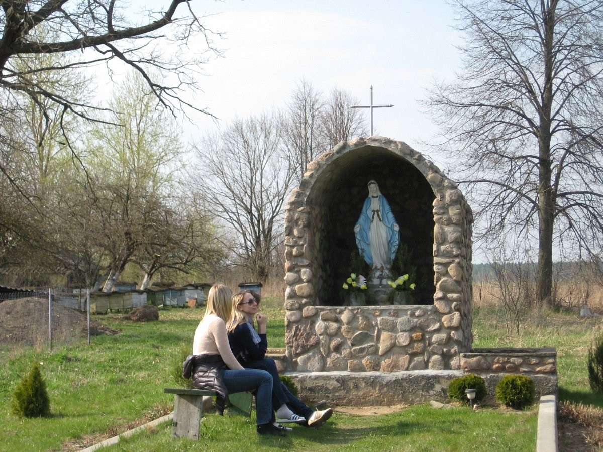 Алешкі. Капліца